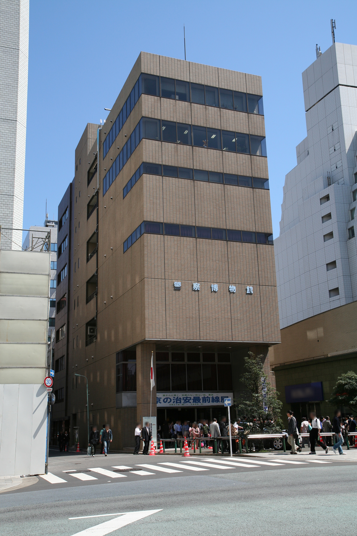 日本の警察博物館